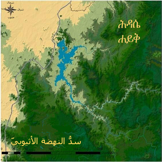 بُحيرة مُتجمِّعة خلف سدّ النهضة الأثيوبي.